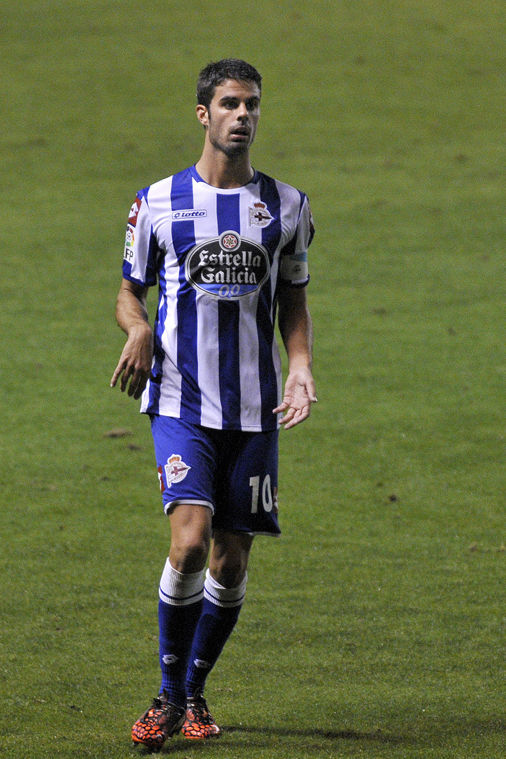 Juan Domínguez Lamas playing for Deportivo la Coruna